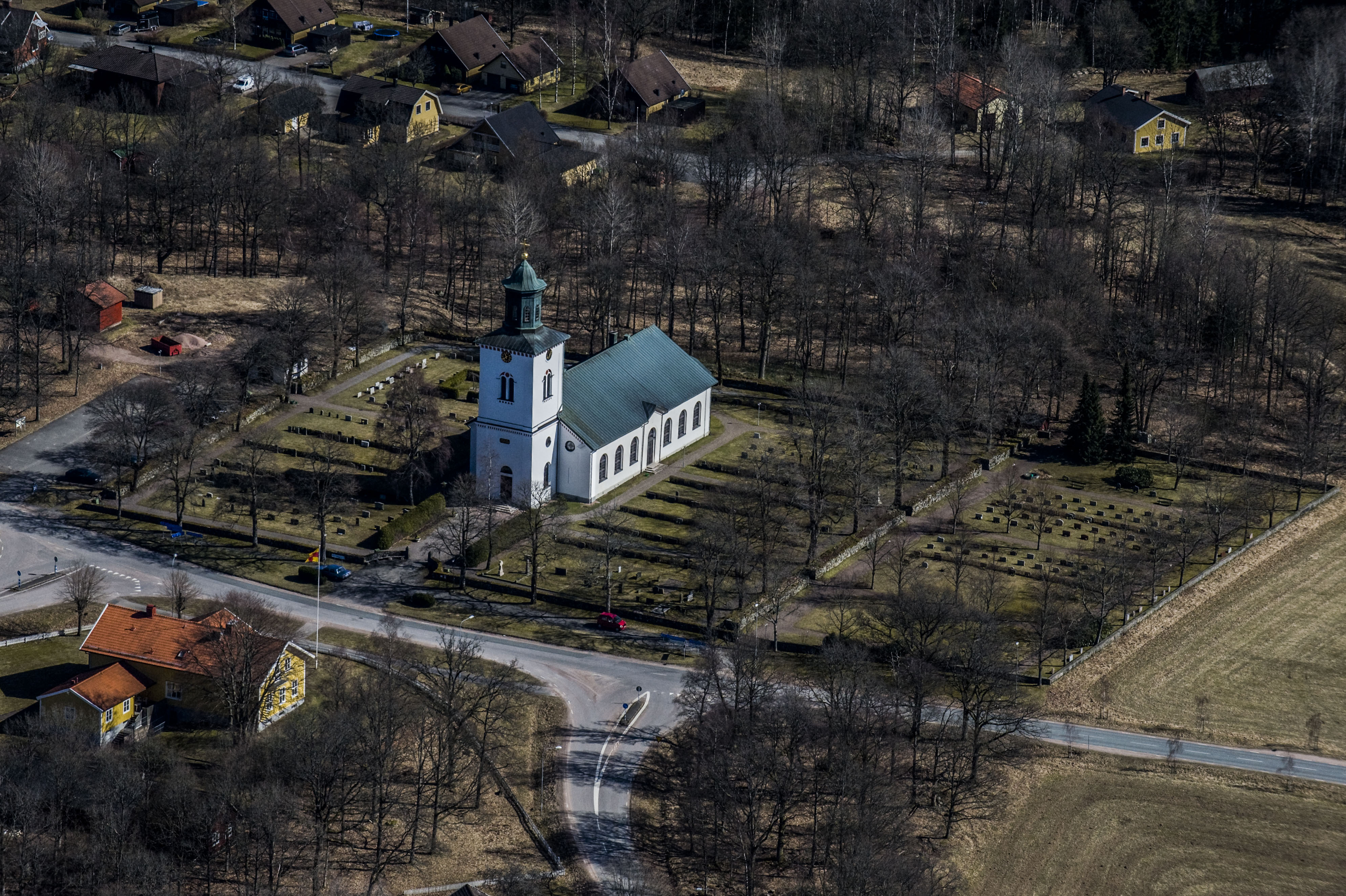 Åsenhöga Kyrka från luften